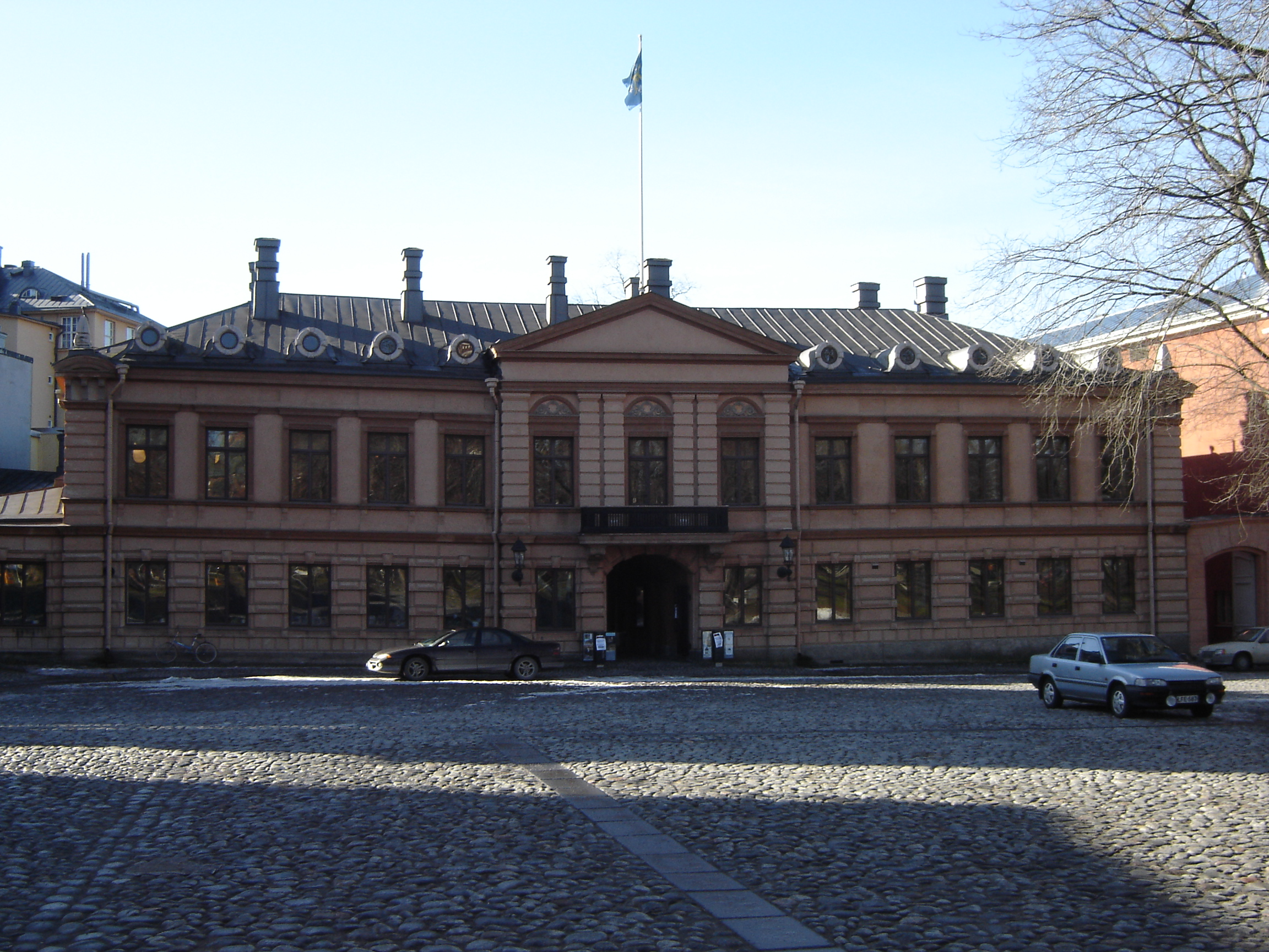 Brinkkalan talo